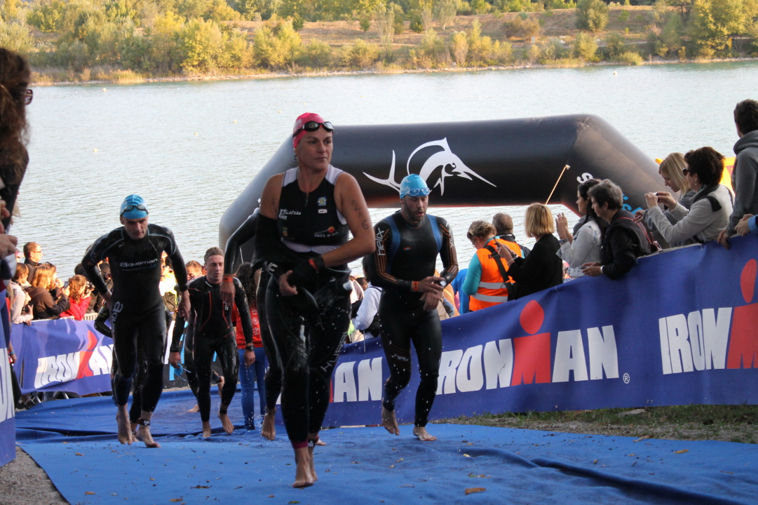 Marie Pierre Husson. IMPA 70.3 2013.France